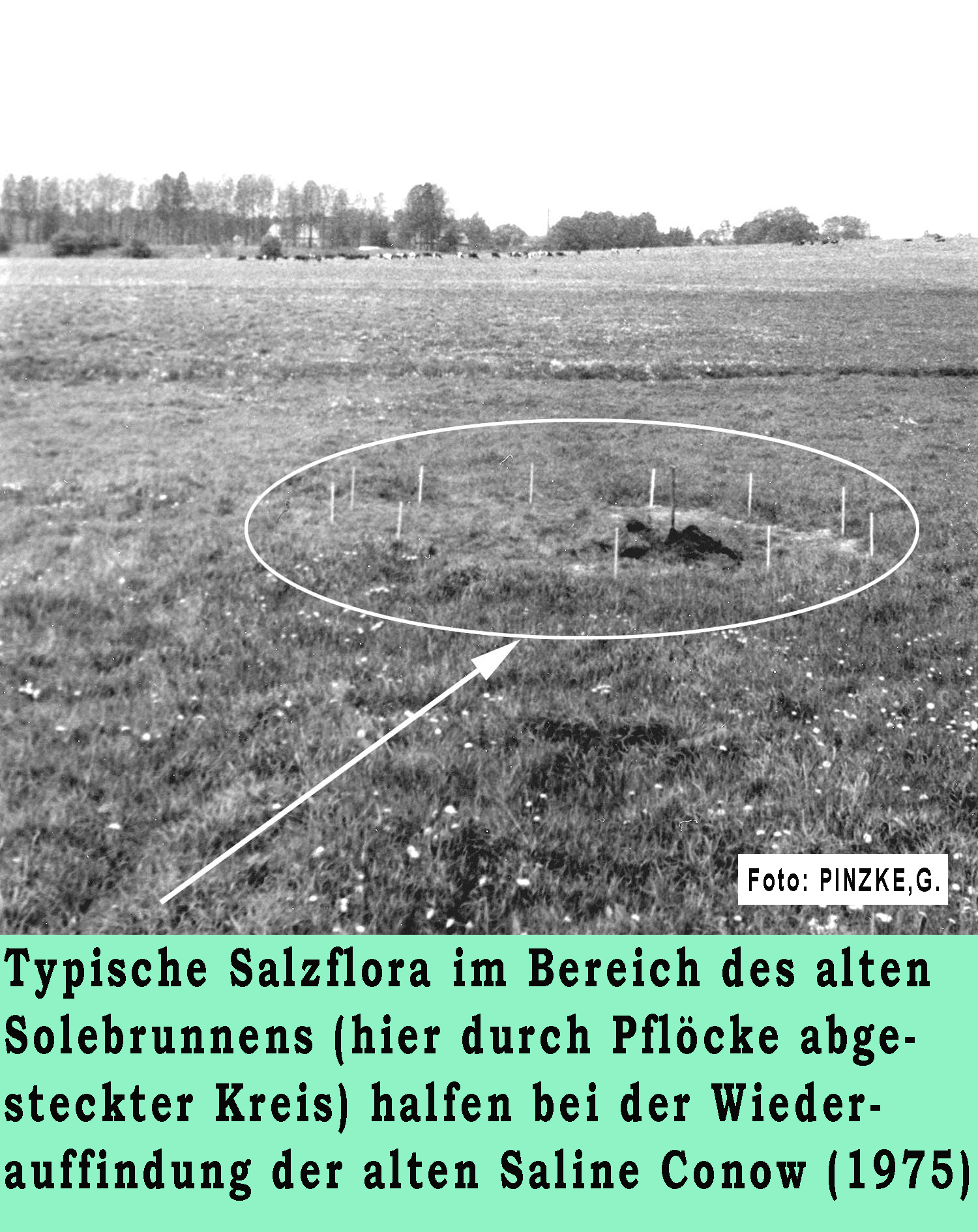 Salzquelle Conow, chem. Zusammensetzung 2